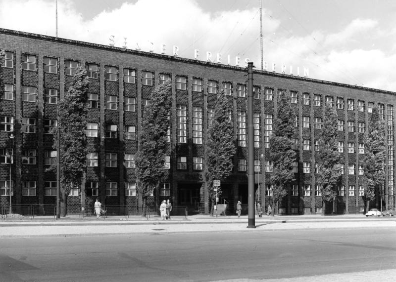 West-Berlin, Masurenallee Haus des Rundfunks Sender Freies Berlin